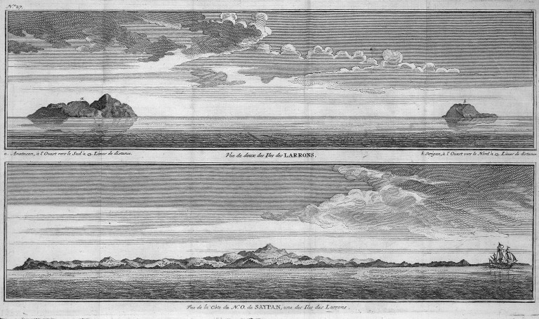 [Illustrations de Voyage autour du monde] Auteur : George Anson Éditeur : Henri-Albert Gosse et Compagnie (Genève) 1750